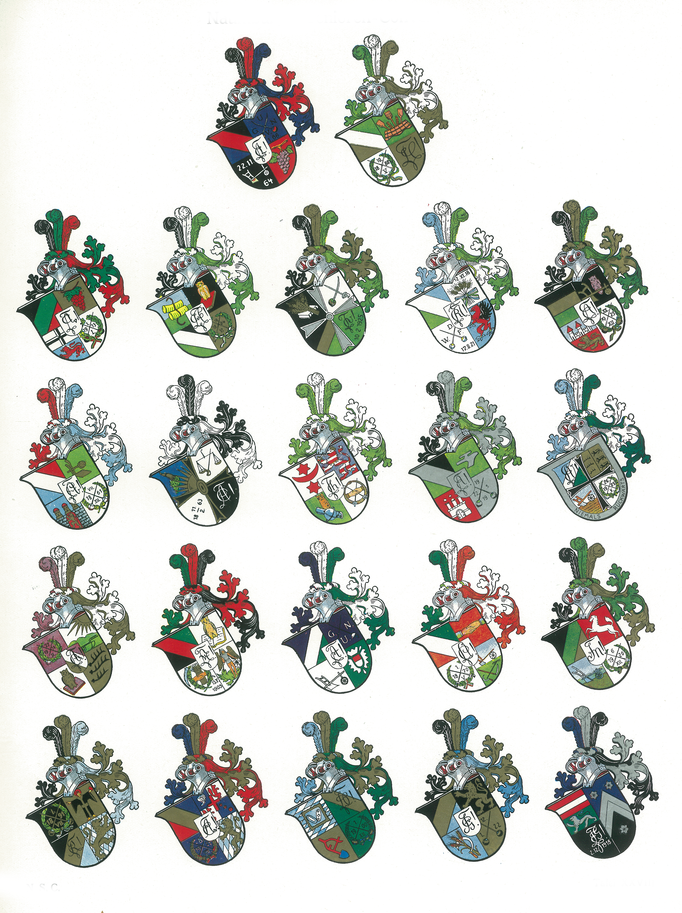 Studentenwappen des Naumburger Senioren-Convents.